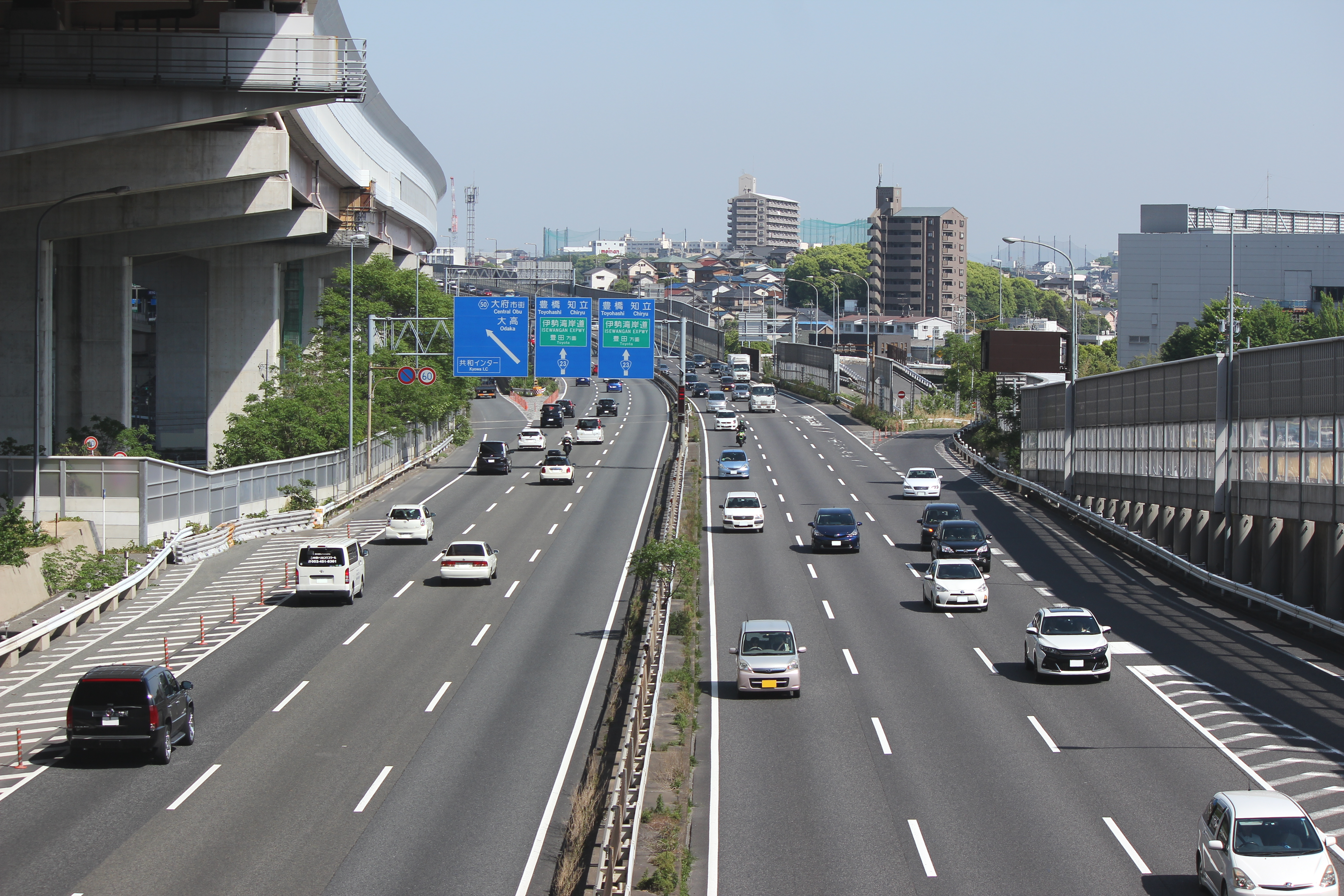 国道23号名四国道の第二東名並行部（名古屋市緑区）